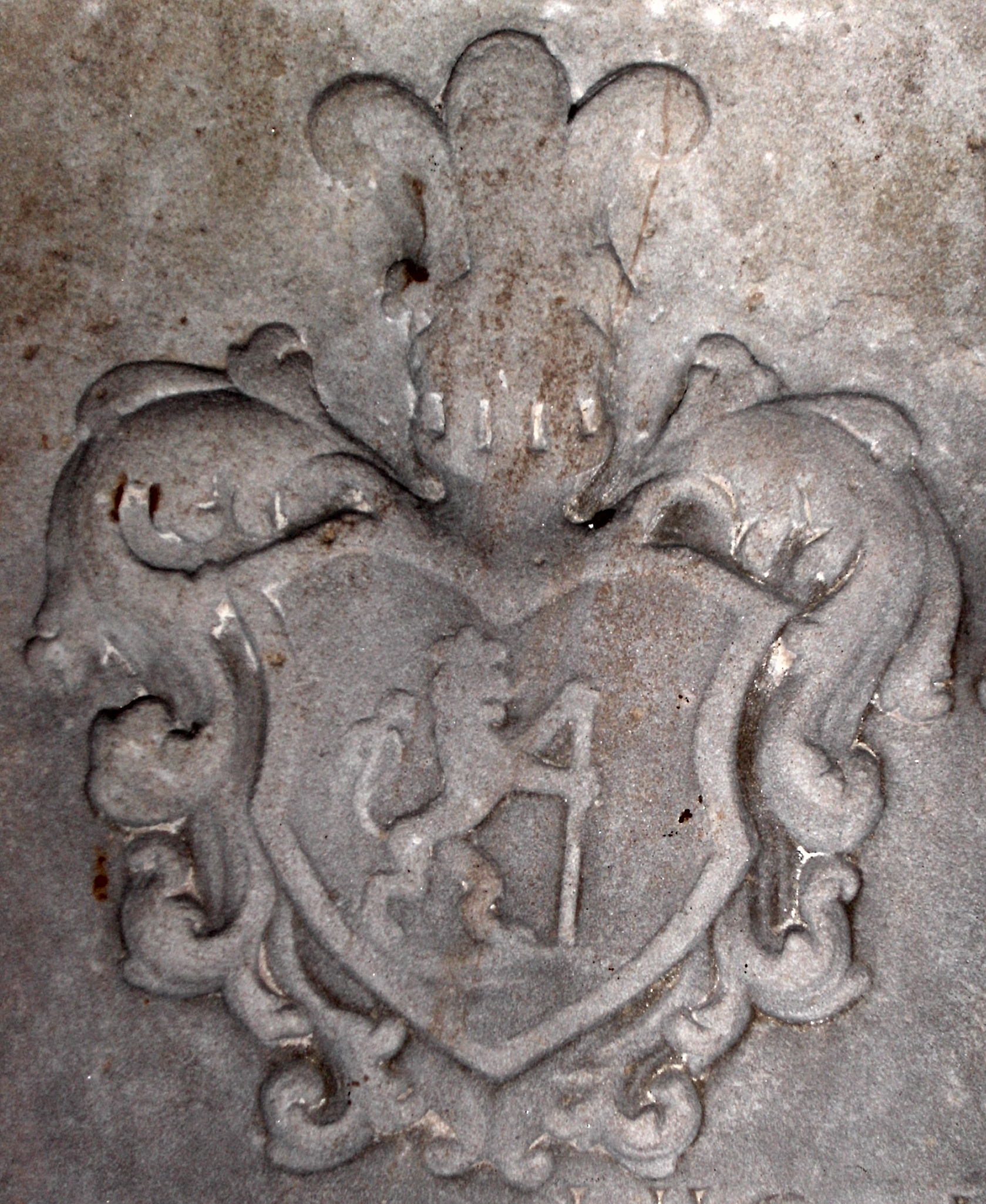 Wappen Familie "von Stengel" Kurpfalz/Bayern